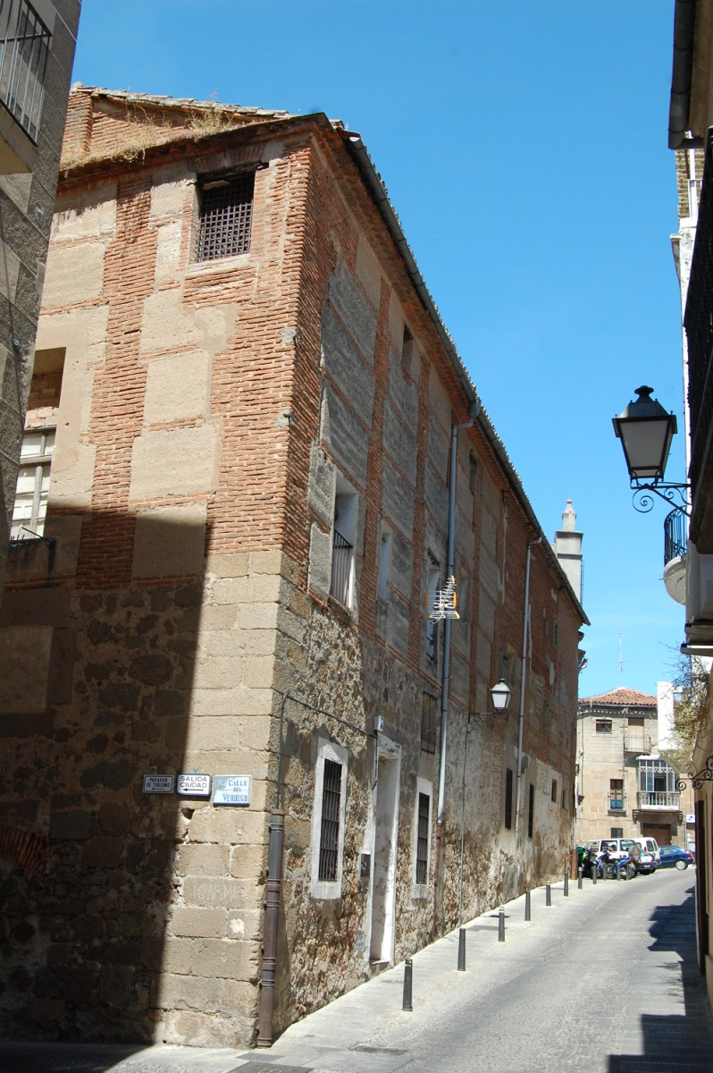 LA MUY NOBLE Y LEAL..NIKON D40 130